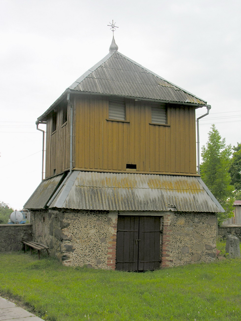 Pievėnų bažnyčios varpinė Foto: Algirdas, 2005 m. rugpjūčio 6 d.